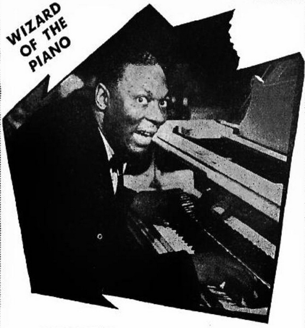 Gene Rodgers